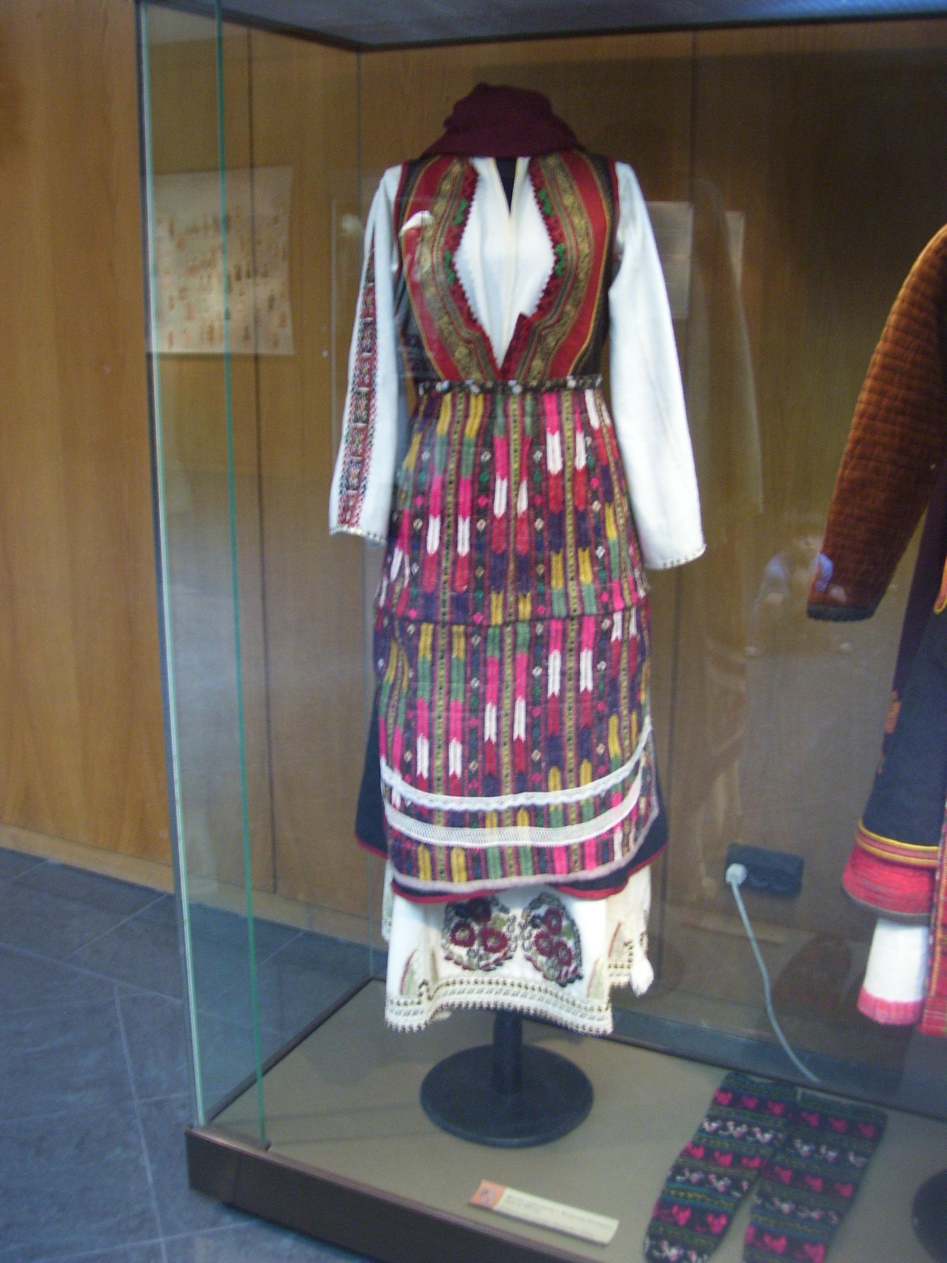 Женска носия от Жужелци, Костурско. Национален исторически музей, София.